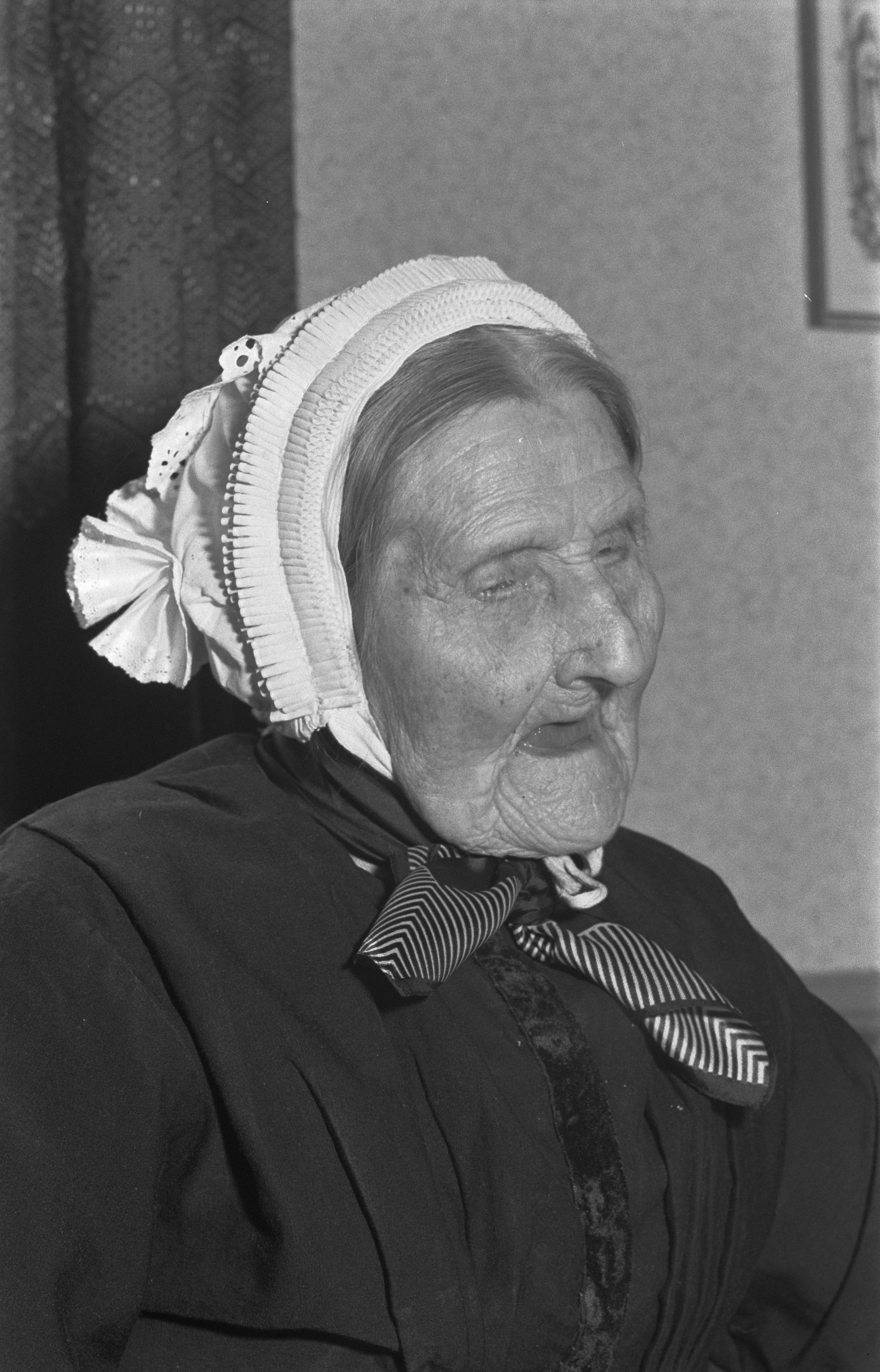 Collectie / Archief : Fotocollectie Anefo Reportage / Serie : [ onbekend ] Beschrijving : 110e verjaardag Chrissemeue met nichtje 5e graad Sylvia Nijwold Datum : 2 oktober 1959 Trefwoorden : verjaardagen Persoonsnaam : Chrissemeue, Sylvia Nijwold Fotograaf : Pot, Harry / Anefo Auteursrechthebbende : Nationaal Archief Materiaalsoort : Negatief (zwart/wit) Nummer archiefinventaris : bekijk toegang 2.24.01.05 Bestanddeelnummer : 910-7208